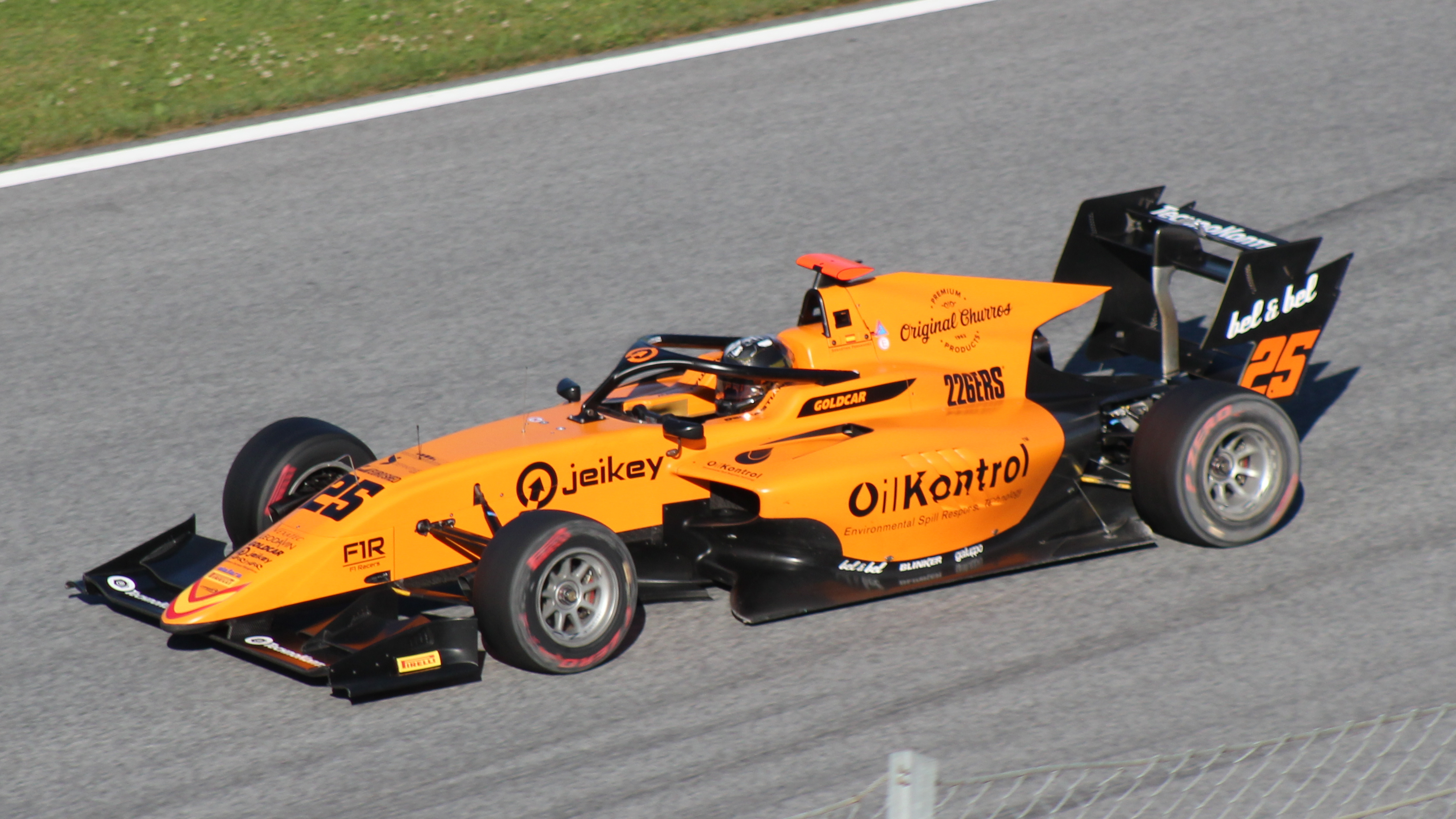 Fernandez beim Rennwochenende in Österreich 2019